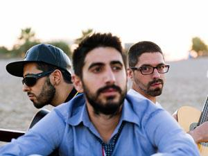 Imágen promocional Aslándticos 2012